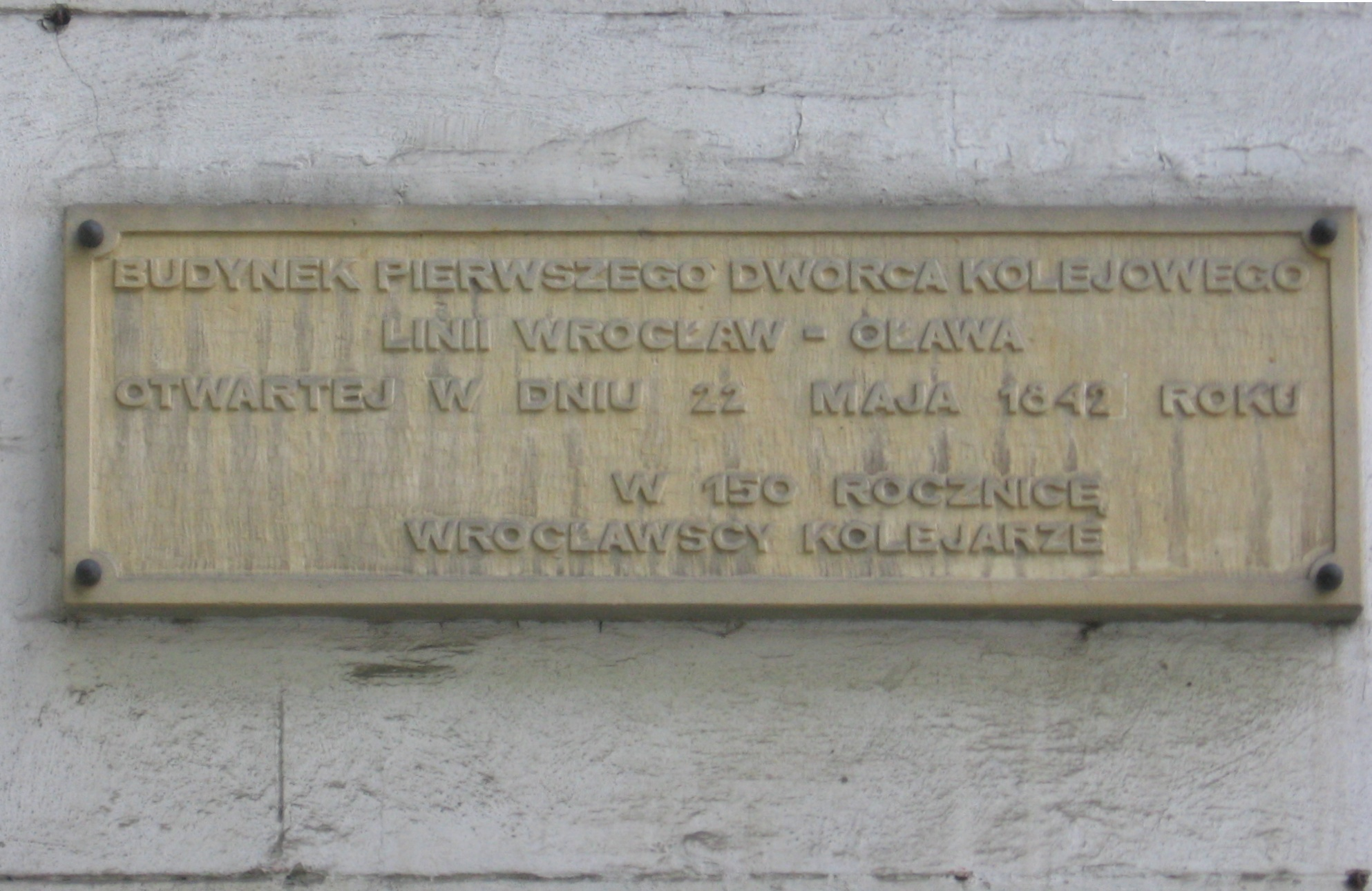 tablica pamiątkowa na ścianie budynku głównego Dworca Kolei Górnośląskiej (Oberschlesische Eisenbahn) wmurowana w 150-lecie powstania pierwszego jej odcinka: 1842-1992